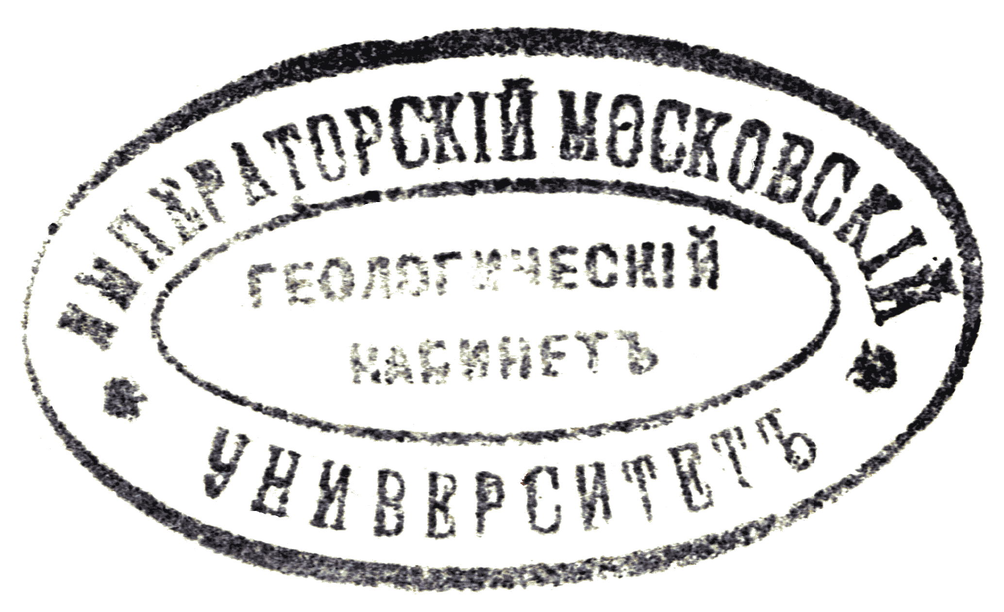 Печать библиотеки: Императорский Московский университет, Геологический кабинет.